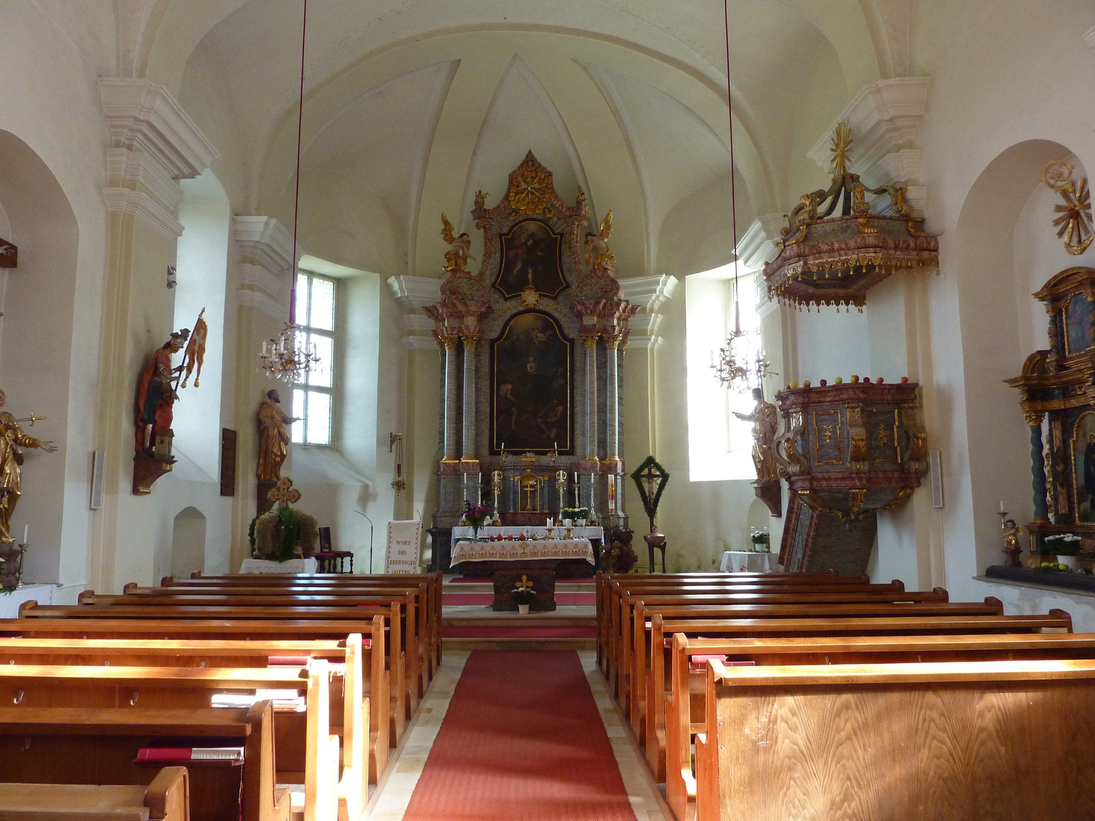 Pfarrkirche hl. Veit, Modriach, Steiermark